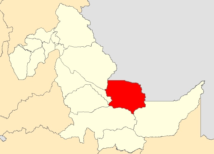 Mapa distrito Yurua,Ucyali - Perú